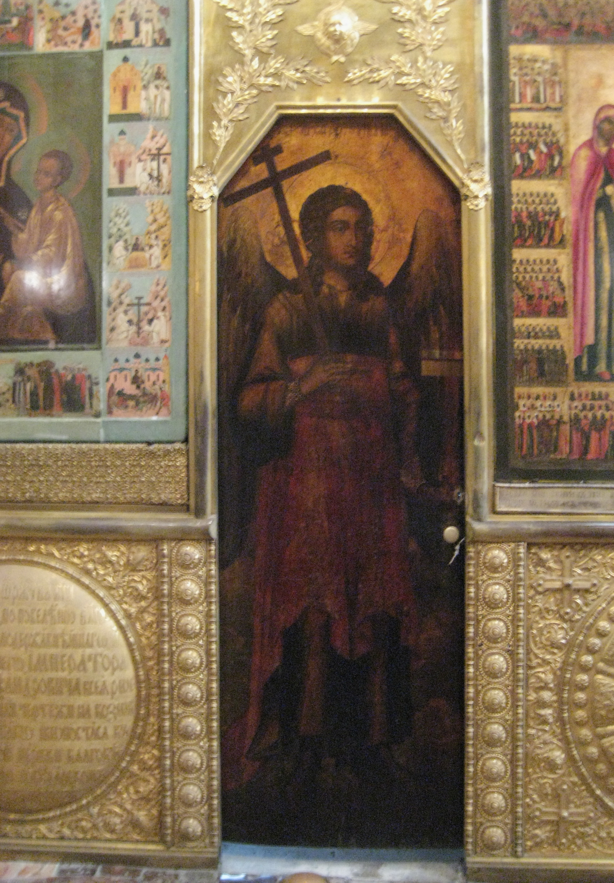 Благовещенский собор (Московский Кремль)